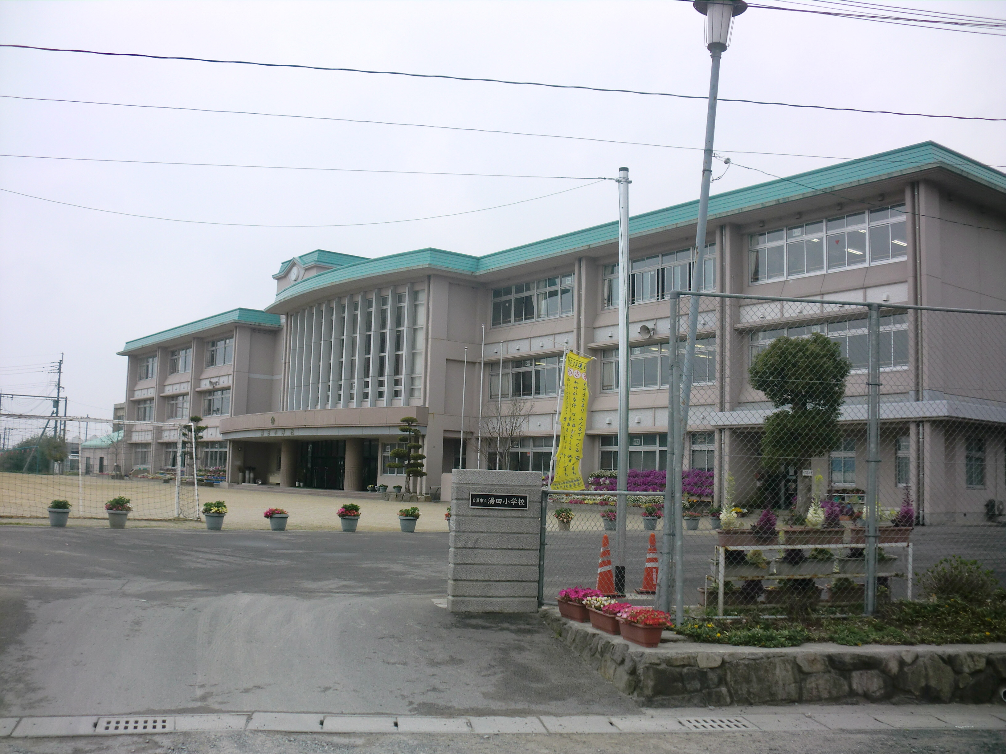 日置市にある日置市立湯田（ゆだ）小学校